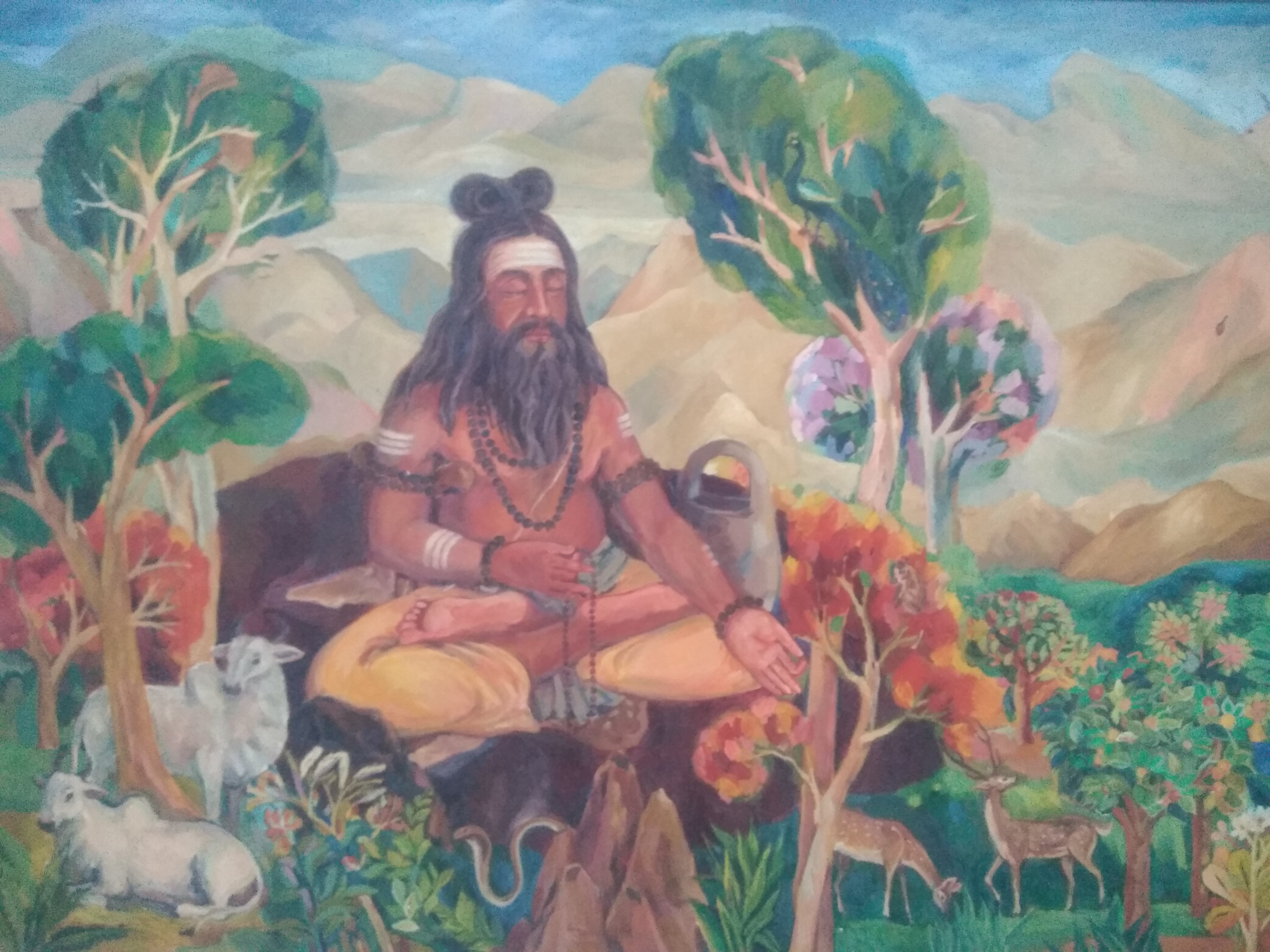 అగస్త్య మహర్షి: అగస్త్యుడు లేపాక్షి లోని కూర్మ శిలపైన కూర్చుని కొంతకాలం తపస్సు చేసిన దృశ్యం. Agastya Maharshi: Agastya perfoming penance on Kurmasila near lepakshi. Artist: Kanaka Suri babu.